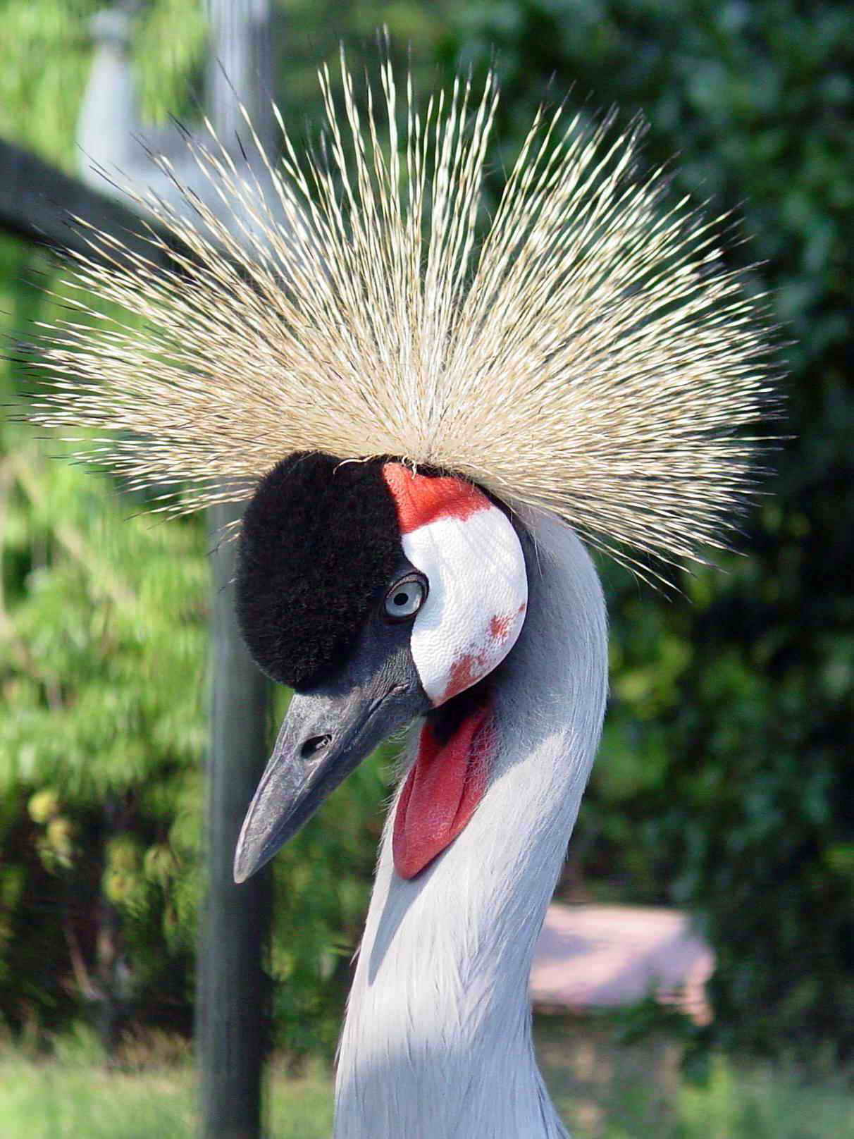 Foto tirada cunha Nikon E8800 en Barraña - Boiro - Galicia. Hai unha finca con aves raras